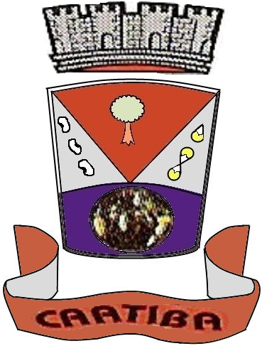 Este é o brasão de Caatiba, cidade do sudoeste da Bahia.